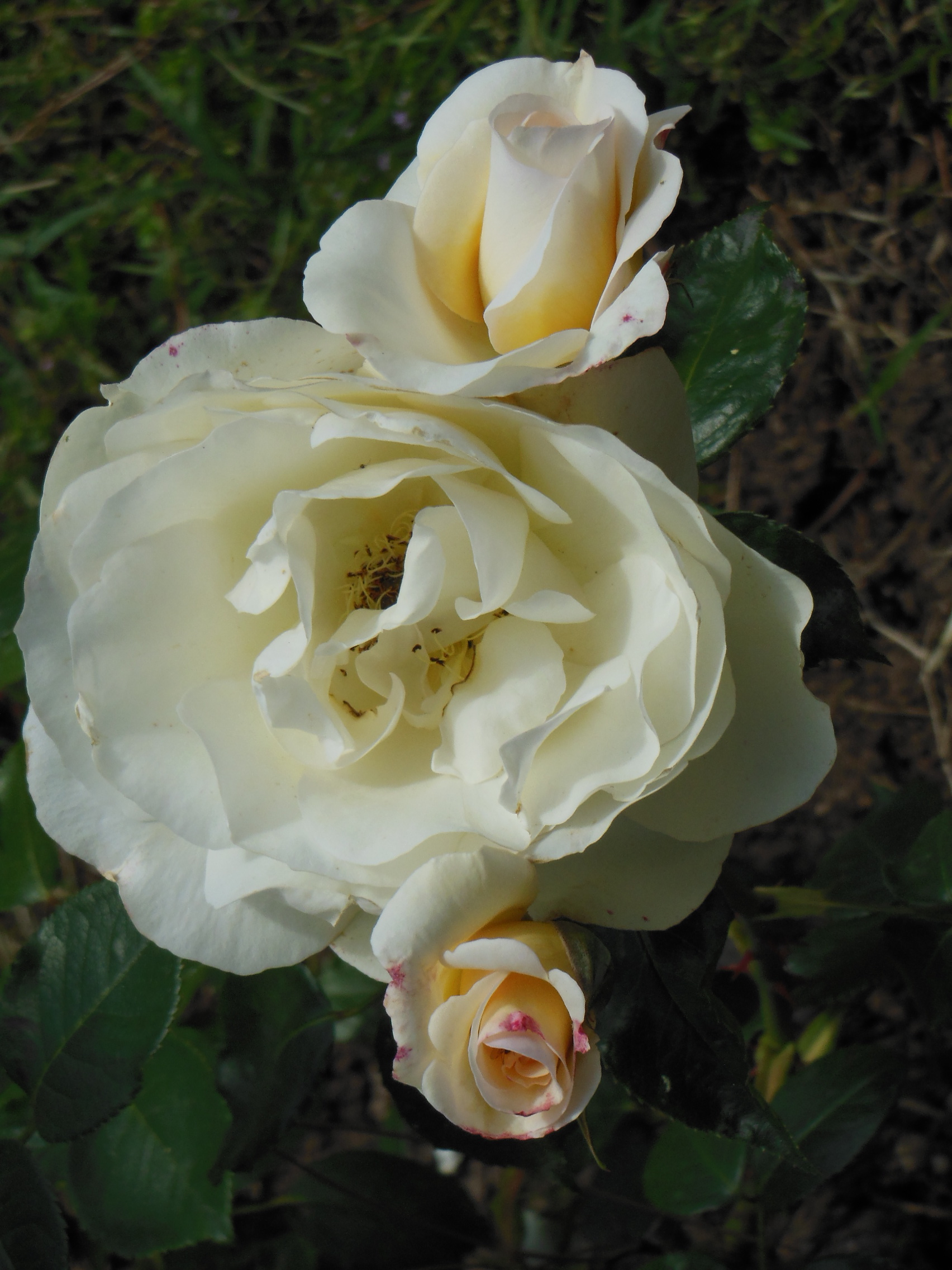 Esemplare di rosa del cultivar Ophelia - Originata in Francia e introdotta da William Paul & Son nel 1912